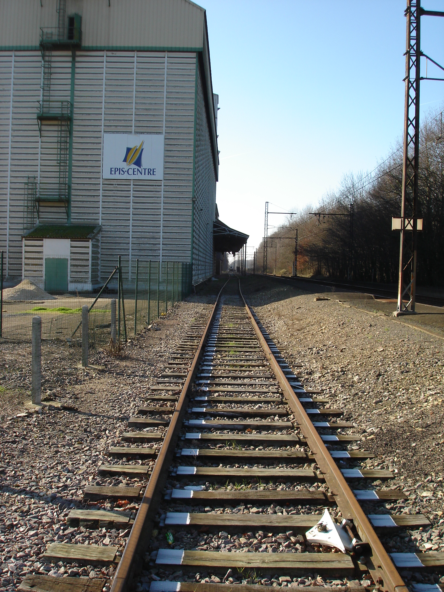 Gare de Montierchaume (36) : La voie de chargement de grains, de la coopérative agricole Épis Centre.